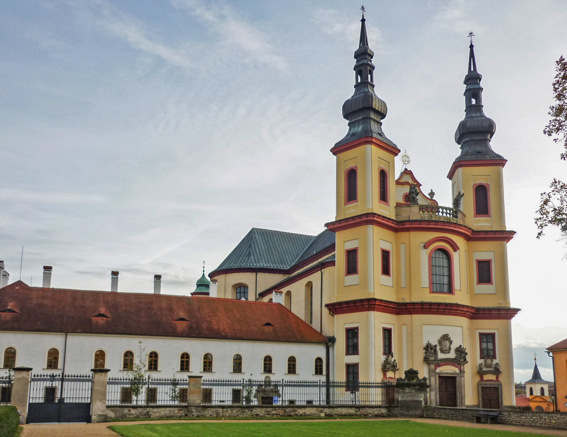 Ehemalige Piaristenkirche in Leitomischl (Litomyšl) in Böhmen